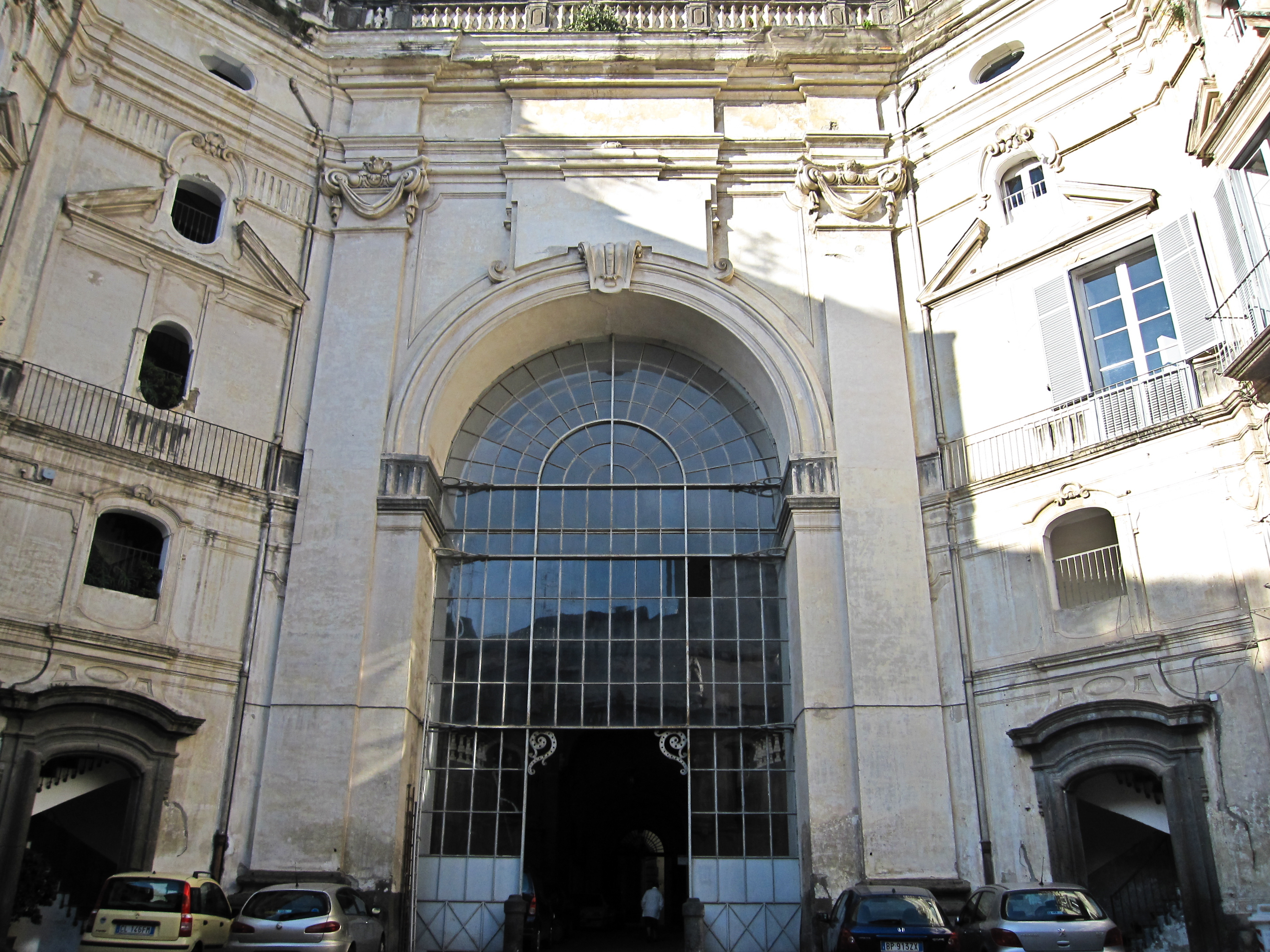 Palazzo Serra di Cassano (Napoli). La facciata sul cortile di accesso da Via Egiziaca